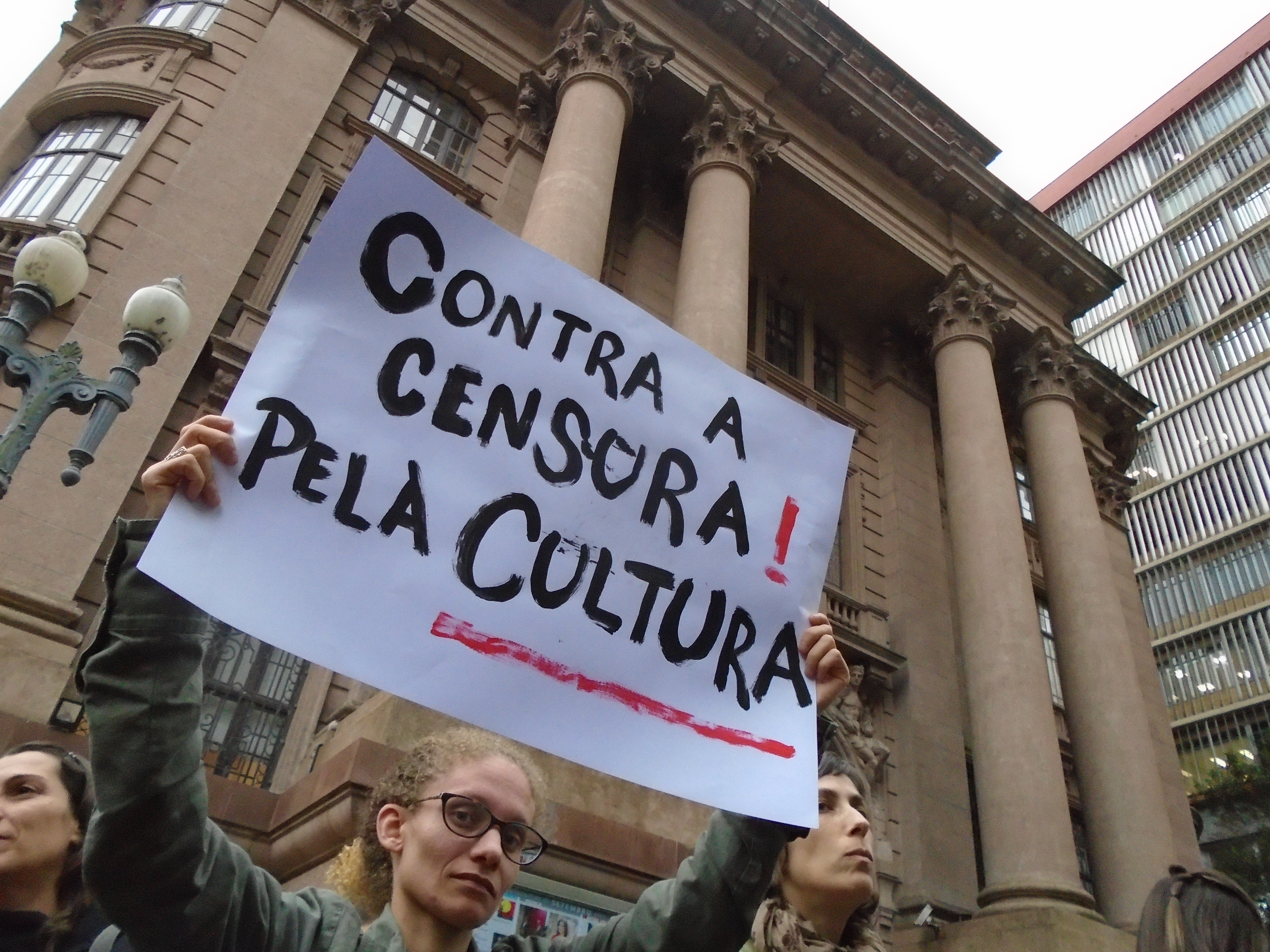 Santander pratica censura